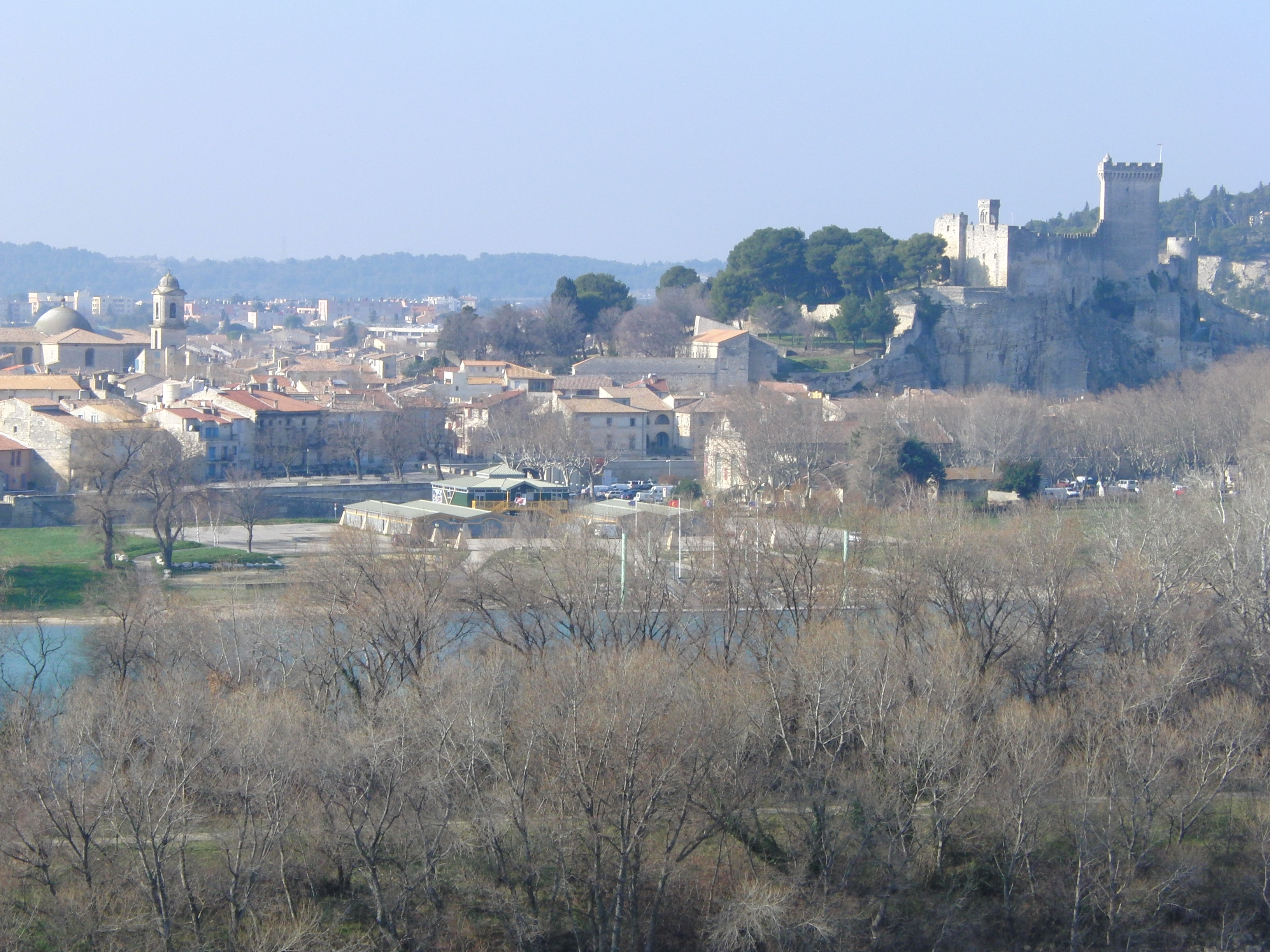 Beaucaire vue du chateau du Roi René à Tarascon